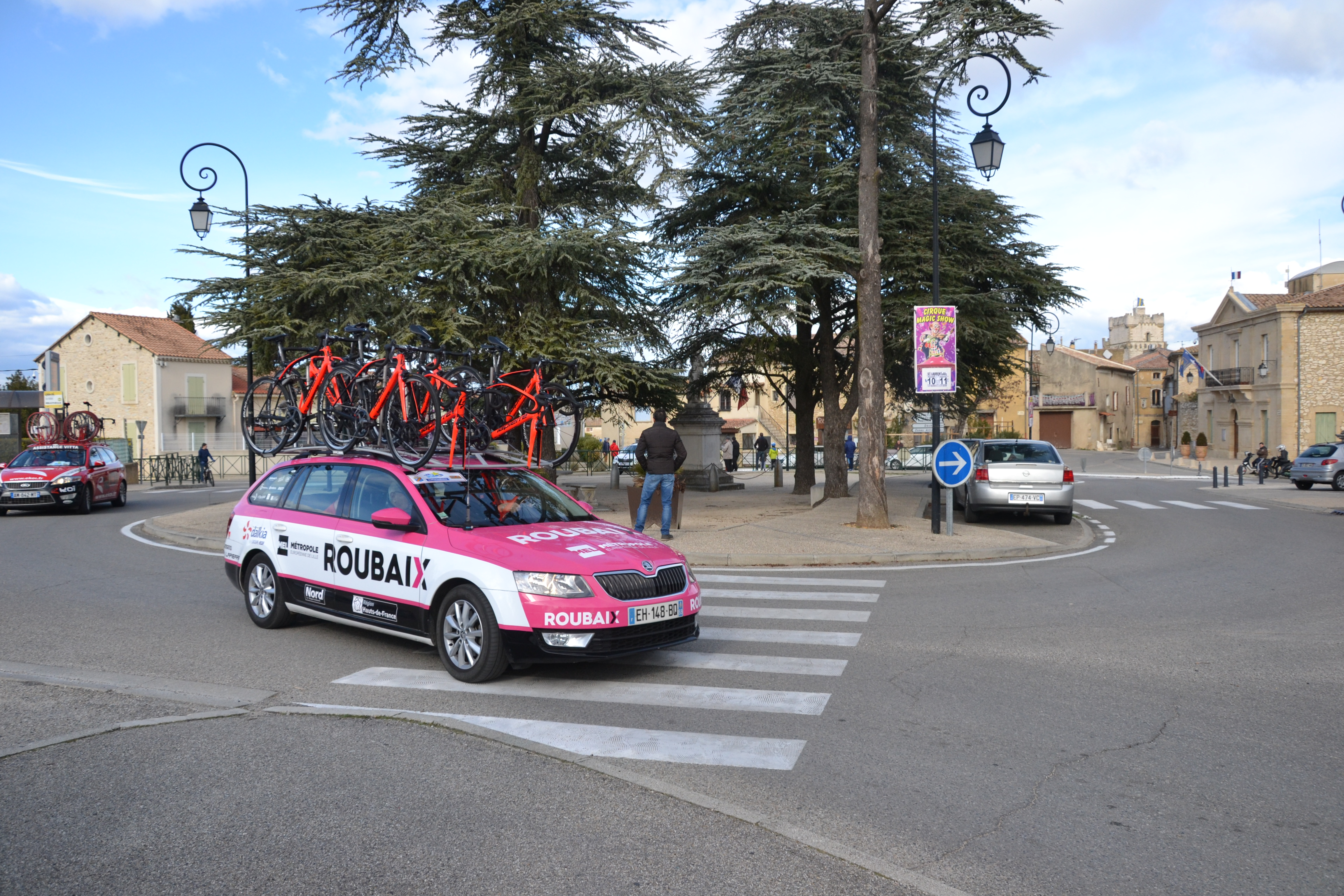 Lors de la 4ème étape de l'Étoile de Bessèges 2018